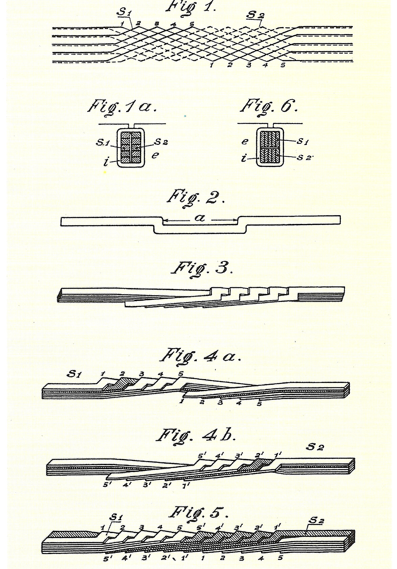 Auszug aus Roebel-Patentschrift vom 19. März 1912